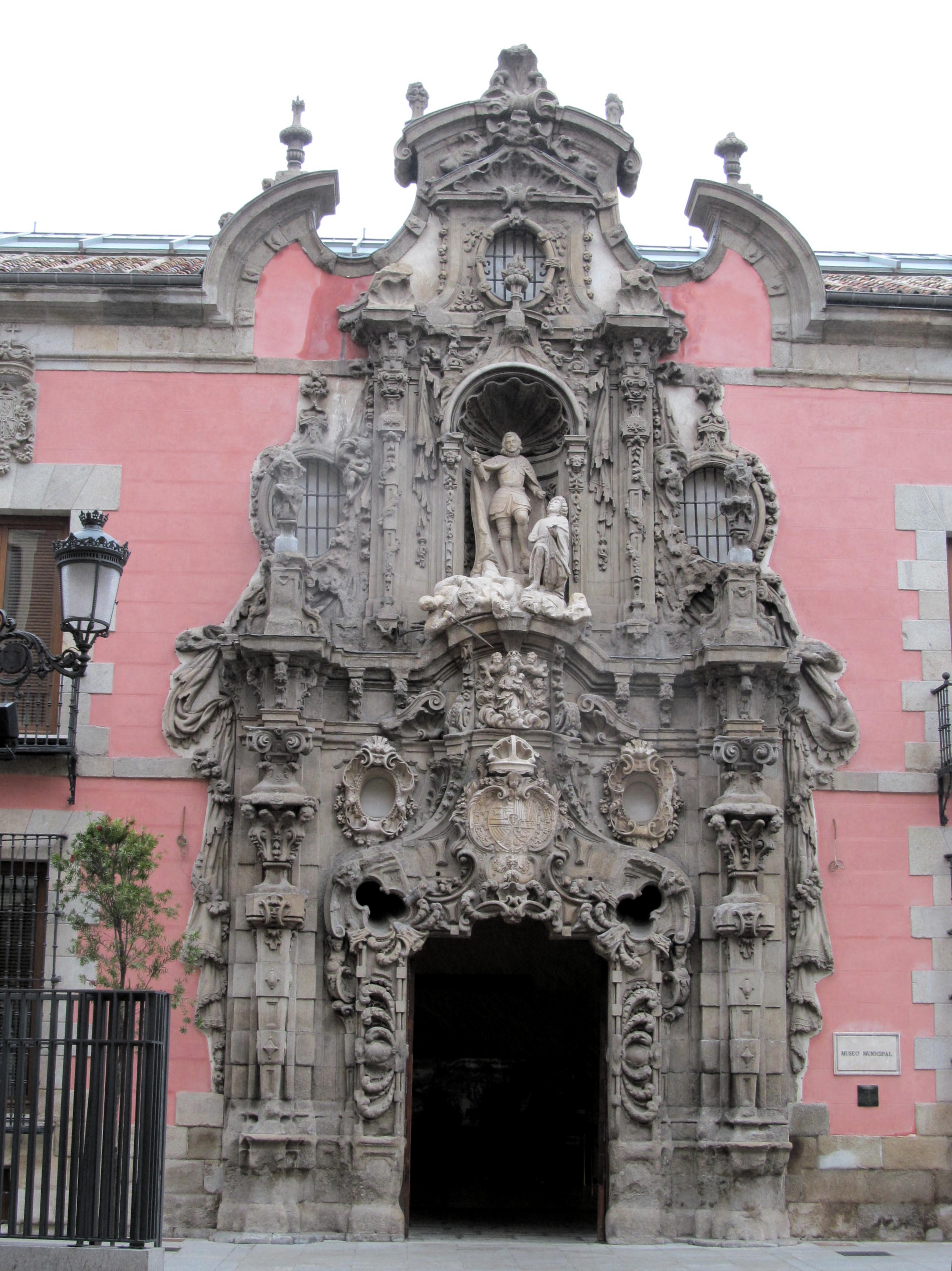 Portada del Museo de Historia de Madrid, obra estilo barroco de Pedro de Ribera.